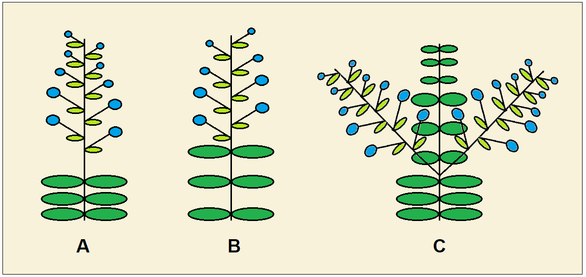 Racemi diversi delle specie del genere Veronica